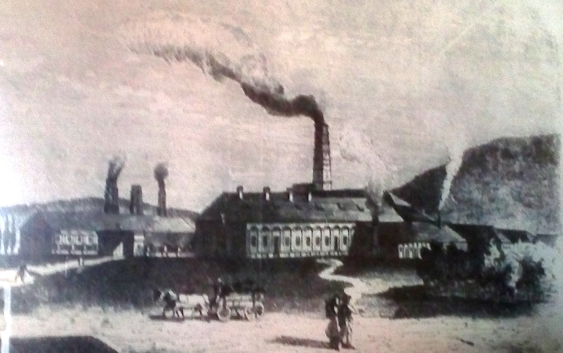 Фото малюнка Шелестівського ливарного заводу